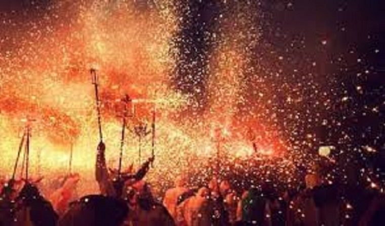 Correfoc del 2014 a Sant Martí de Provençals